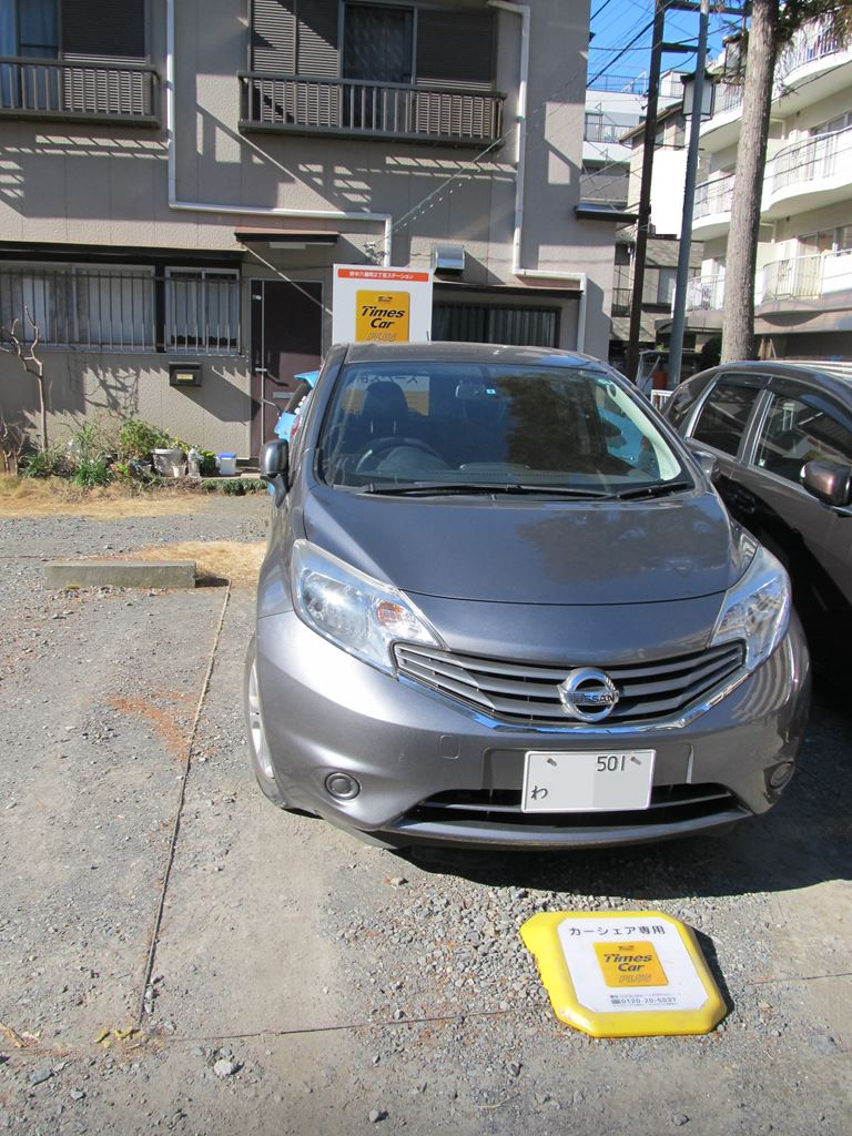 カーシェアTimesCarPlus砂利の平駐車場使用